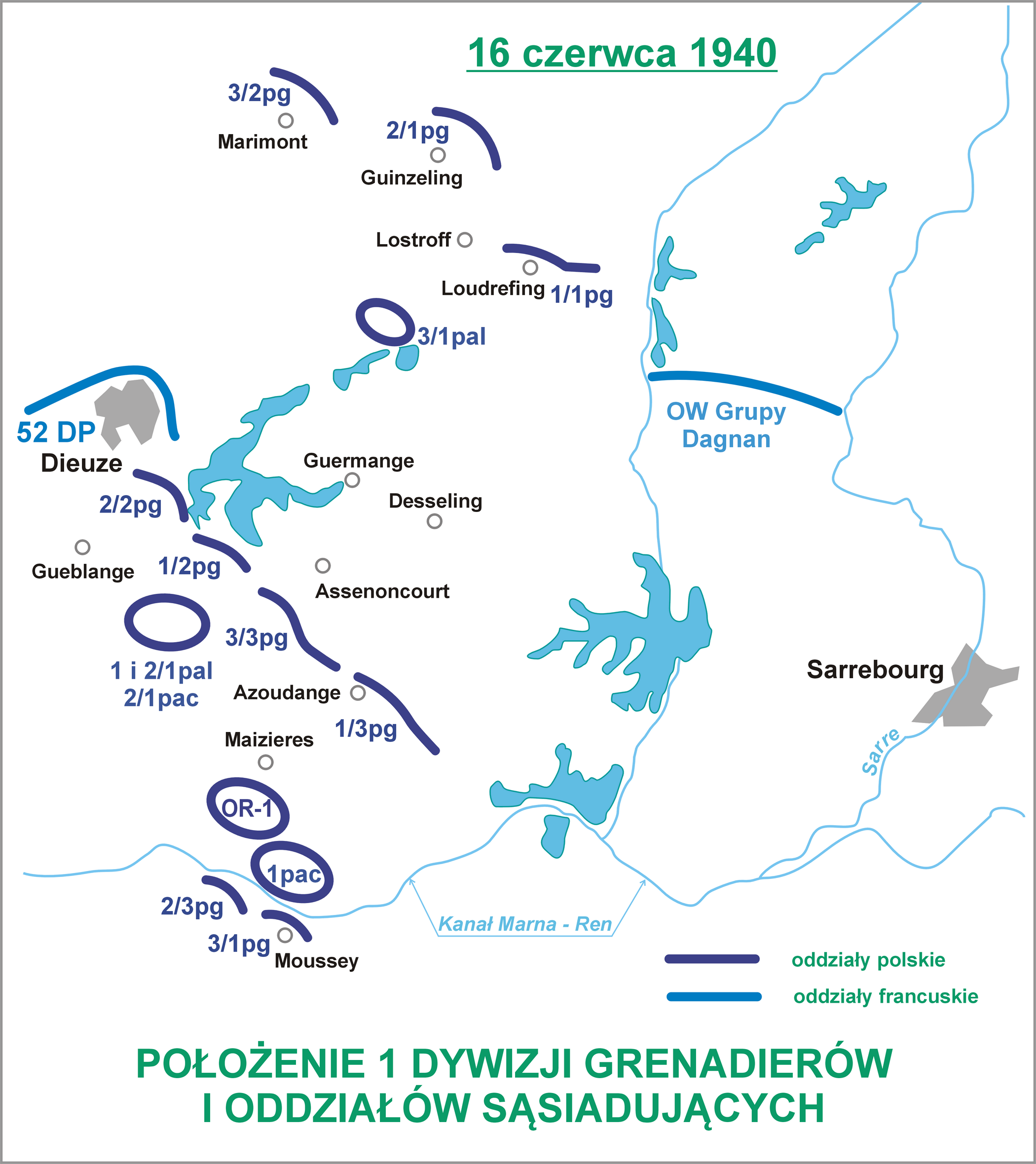 Położenie 1 Dywizji Grenadierów w dniu 16 czerwca 1940